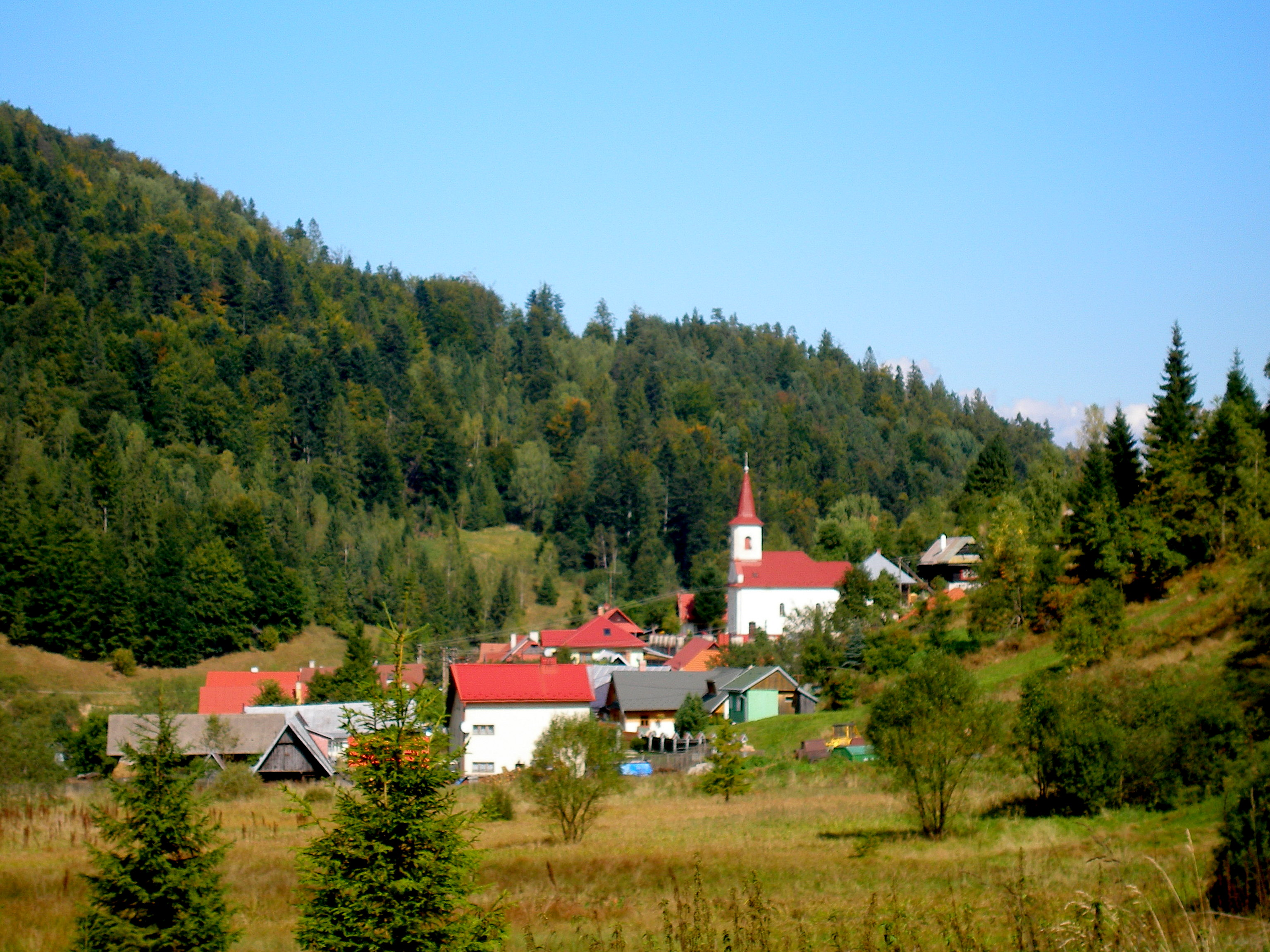 Spišská obec Henclová okres Gelnica.